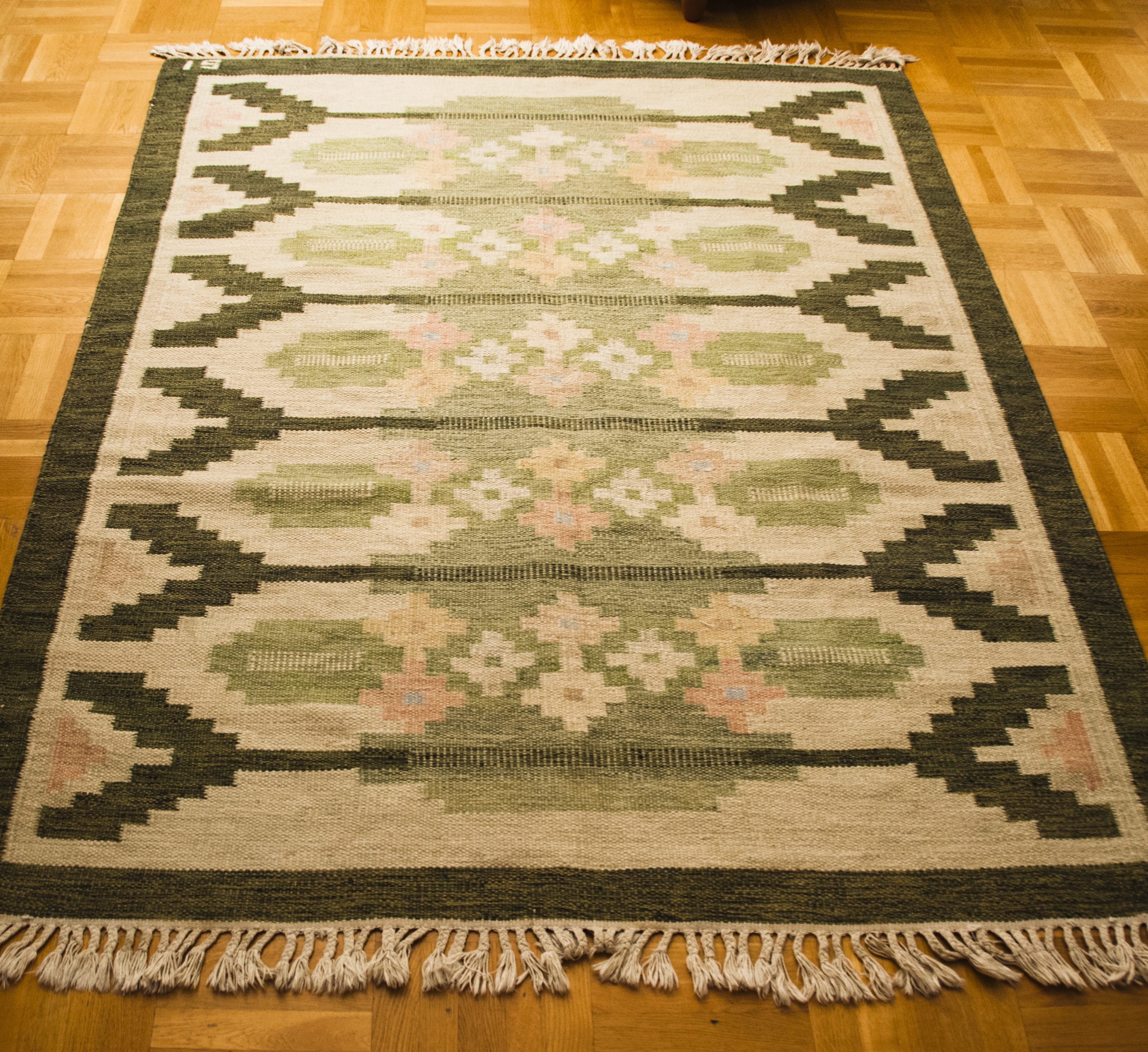 Röllakanmatta signerad Ingegerd Silow